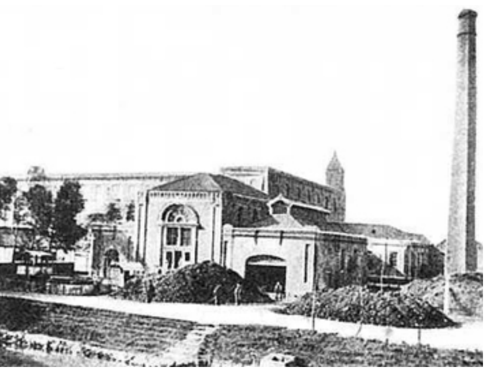 泉州紡績堺本社（のちの岸和田紡績堺工場）、1903年以前